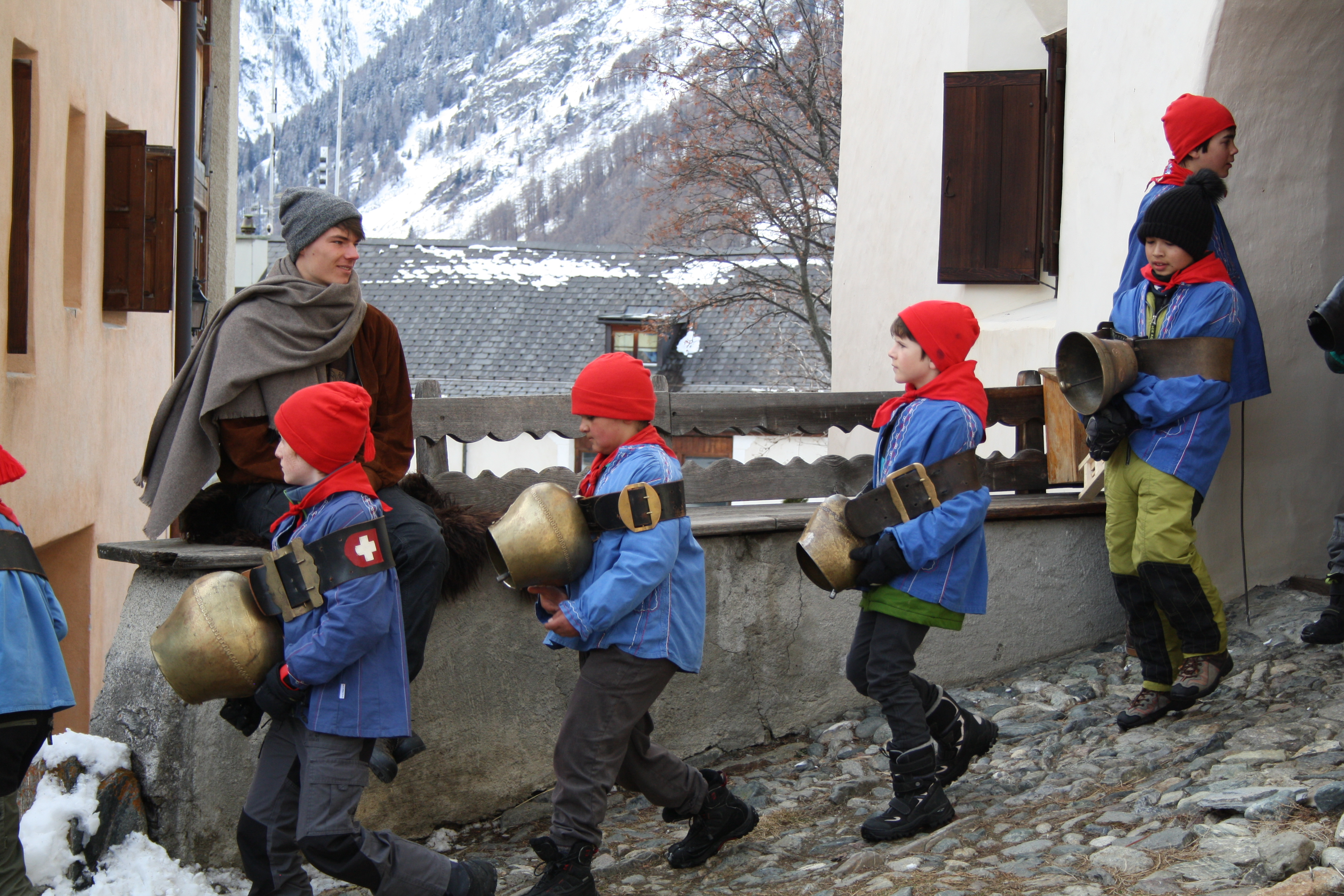 Chalandamarz Guarda 2017